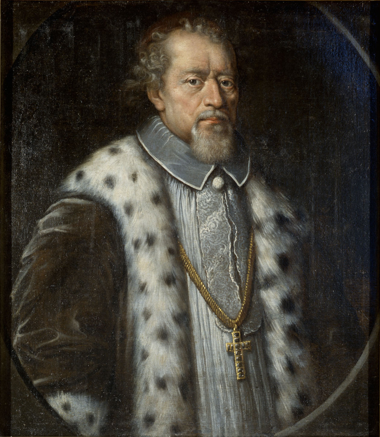 Беларуская (тарашкевіца): Партрэт Паўла Гальшанскага (Pavał Halšanski) пэндзьля Джавані даль Монтэ, сяр. XVI ст.